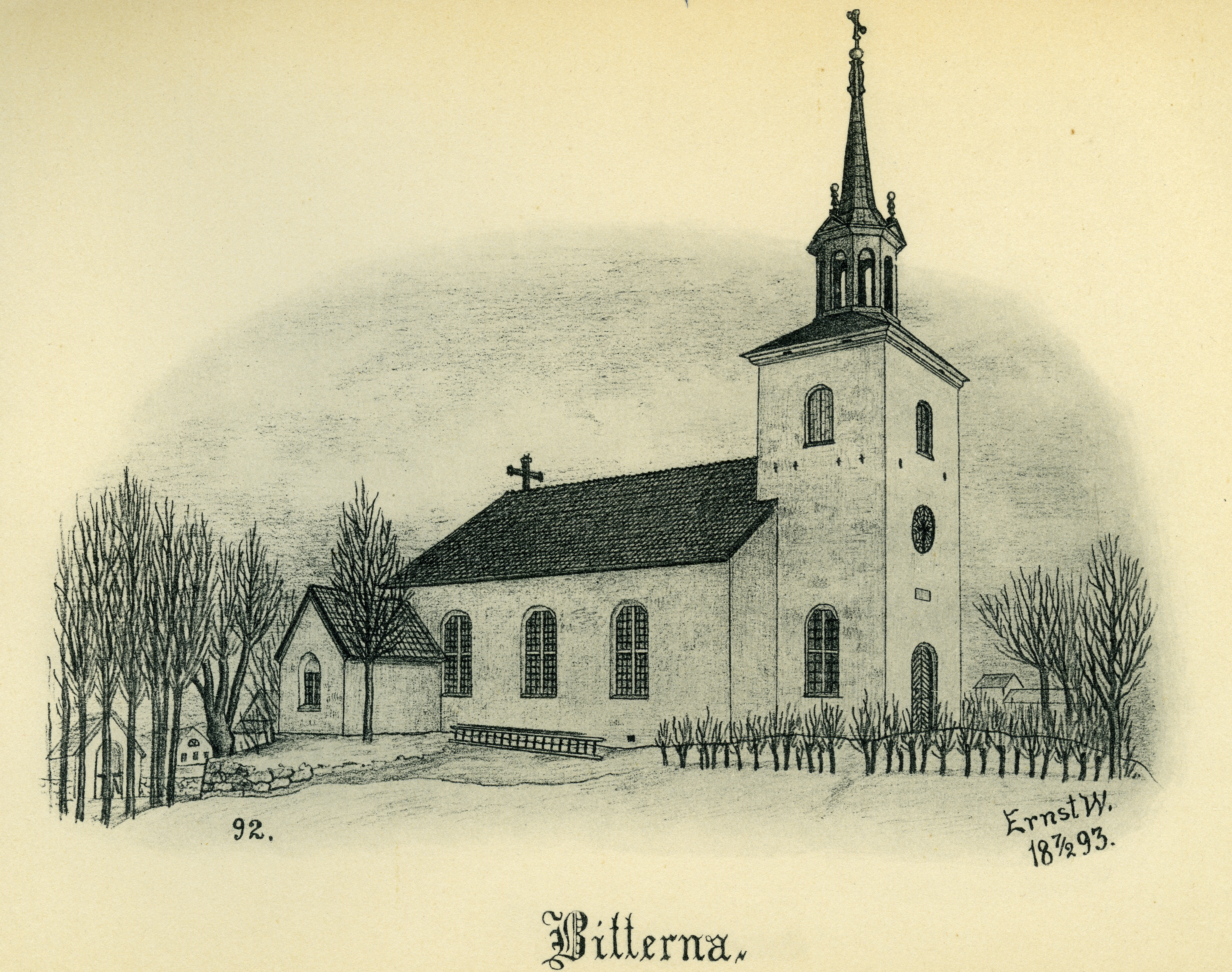 Bitterna kyrka år 1893 i Laske härad, Skara stift, Västergötland, Sverige. Teckning av Ernst Wennerblad ur Skara stifts kyrkor (1902).